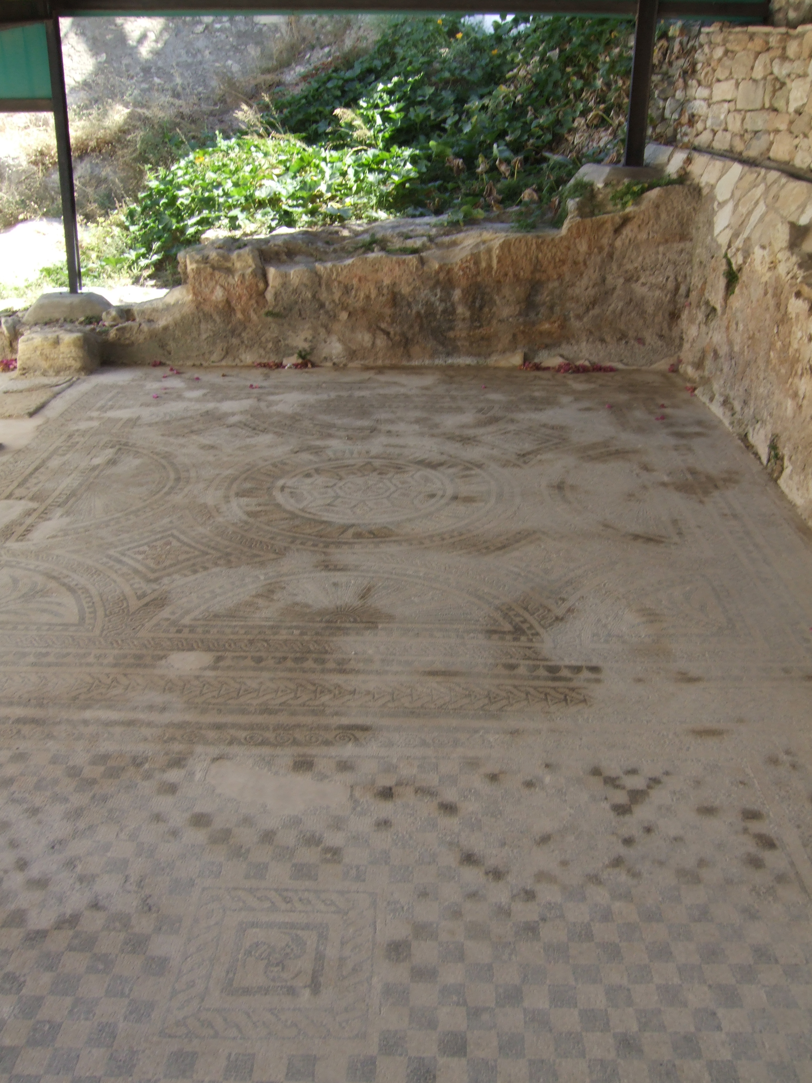 Mosaique romaine à Argiroupoli en Crête